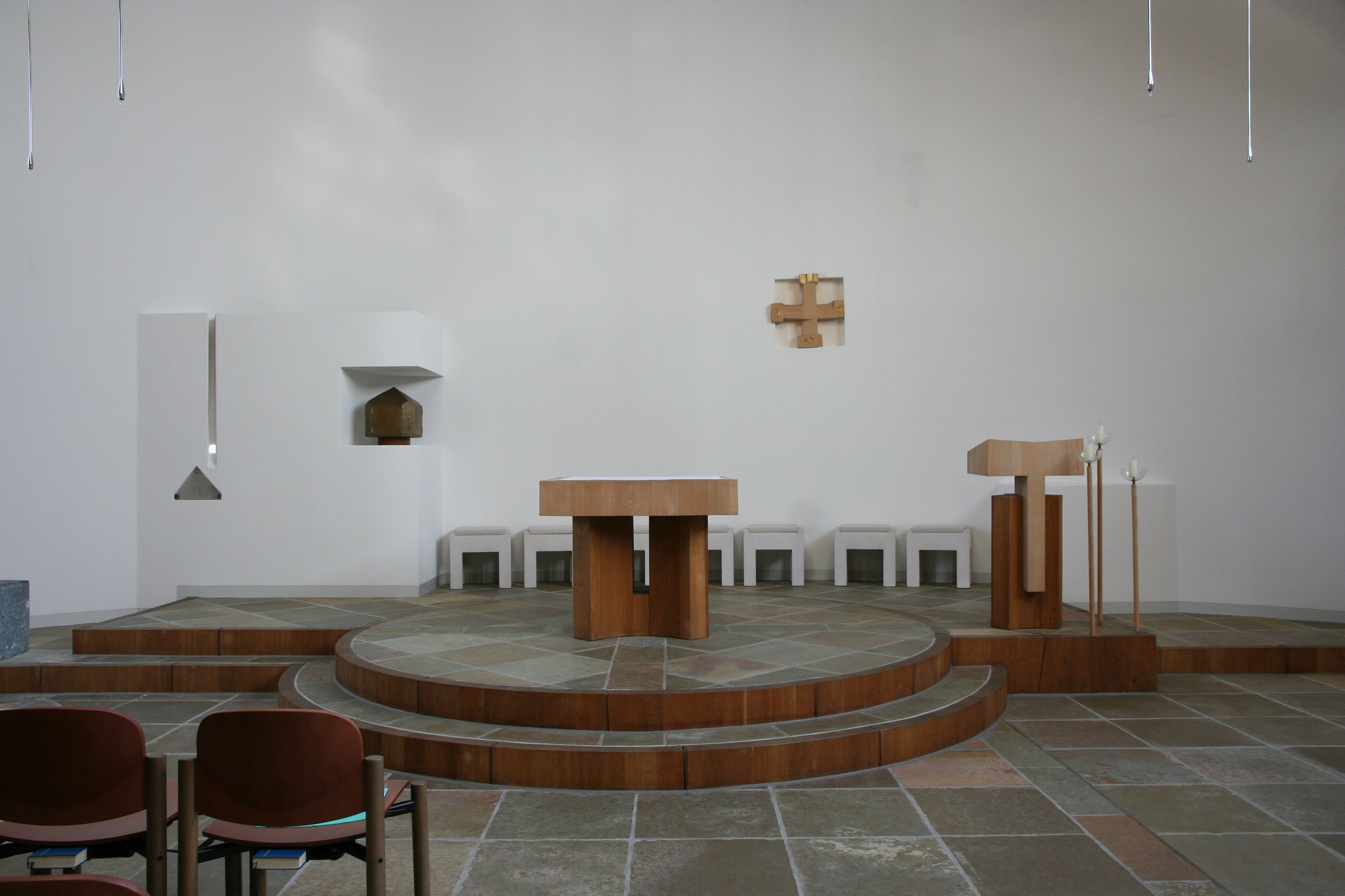 Römisch-katholische Pfarrkirche Maria Magdalena Rafz, Gestaltung von Alois Spichtig